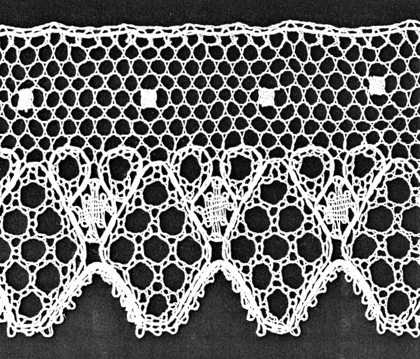 Tylová paličkovaná čipka, nazývaná srdiečková, z Brezovej pod Bradlom z 90. rokov 20. storočia